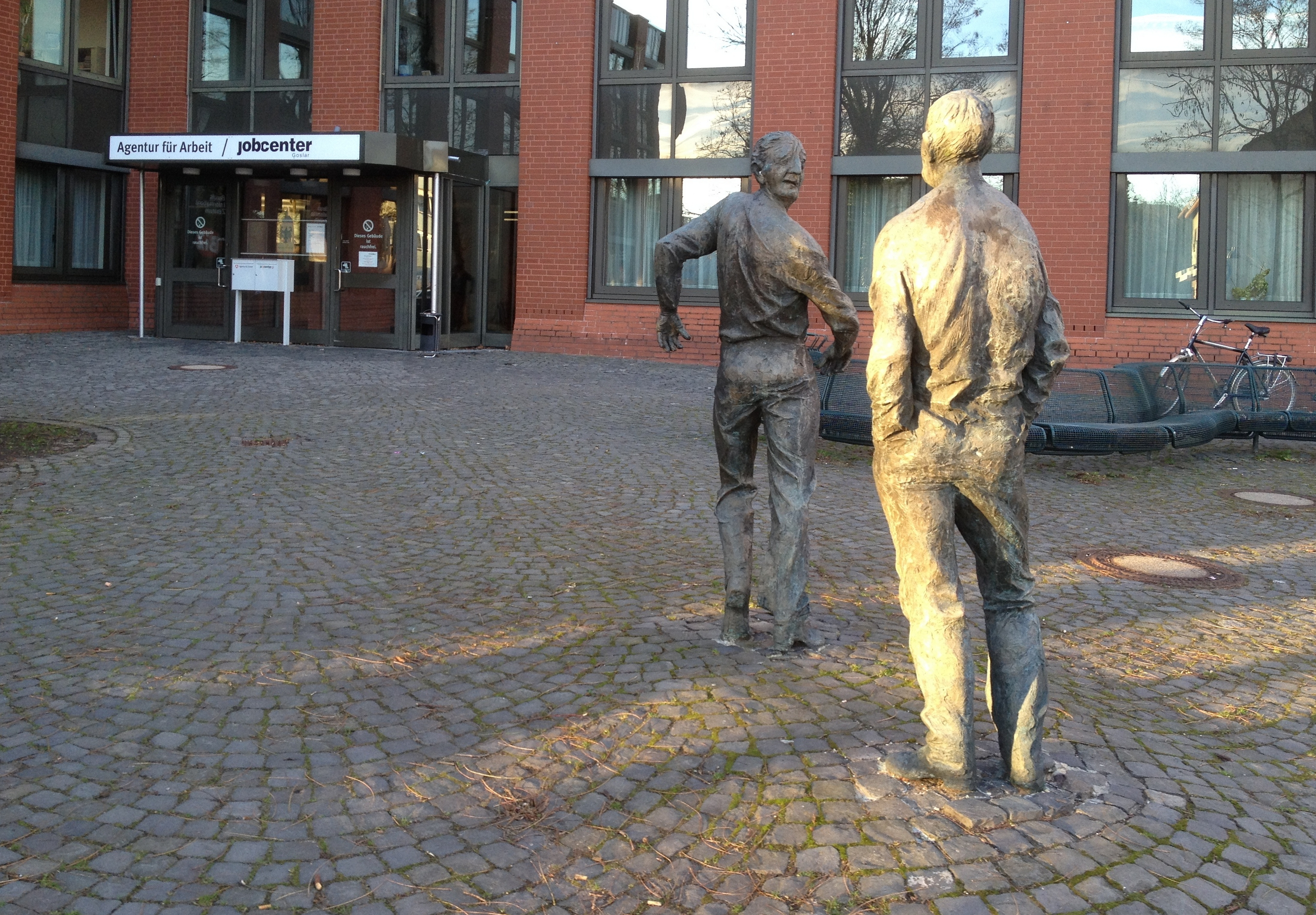 Goslar-Jürgenohl, Jobcenter, Skulpturen